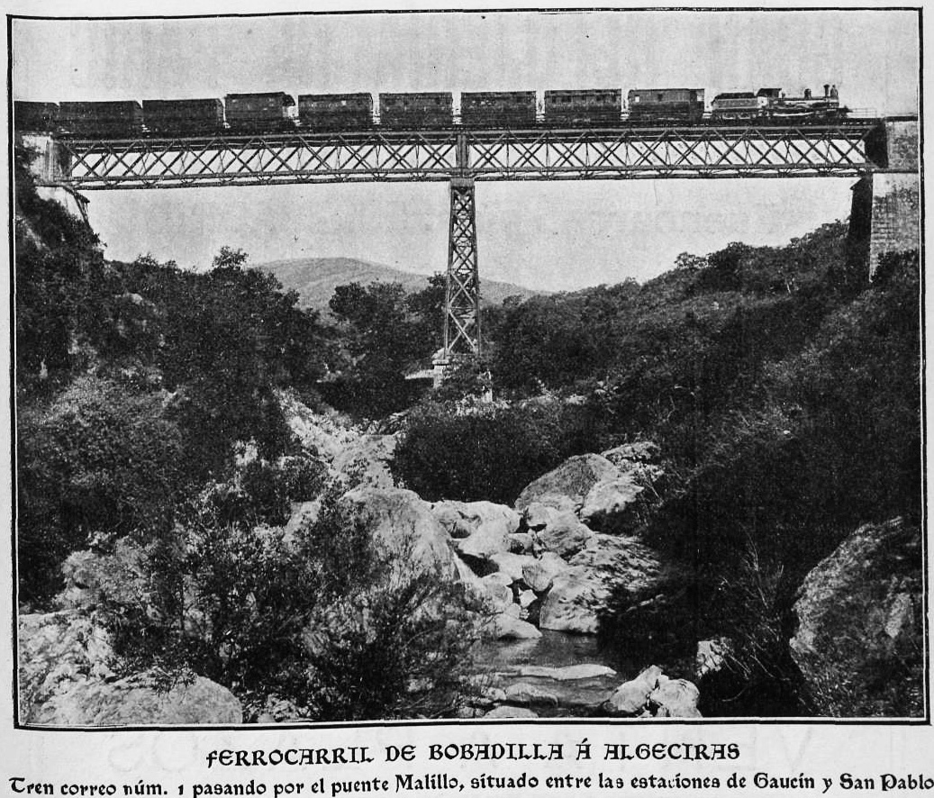 Ferrocarril de BOBADILLA a ALGECIRAS. 1911. Tren correo nº 1 pasando por el puente Malillo, situado entre las estaciones de Gaucín y San Pablo.